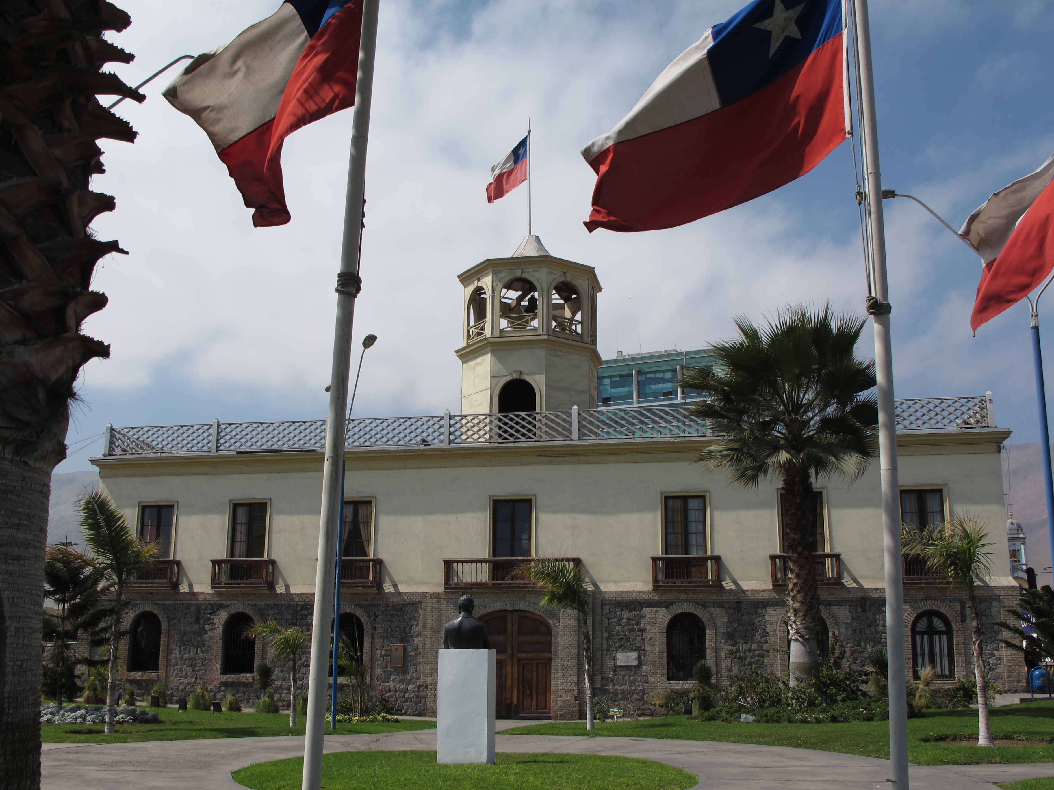 Aduana de Iquique This is a photo of a national monument in Chile: 520